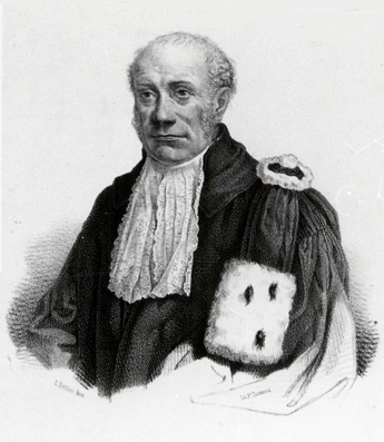 Antonio Alessandrini (1786 – 1861)